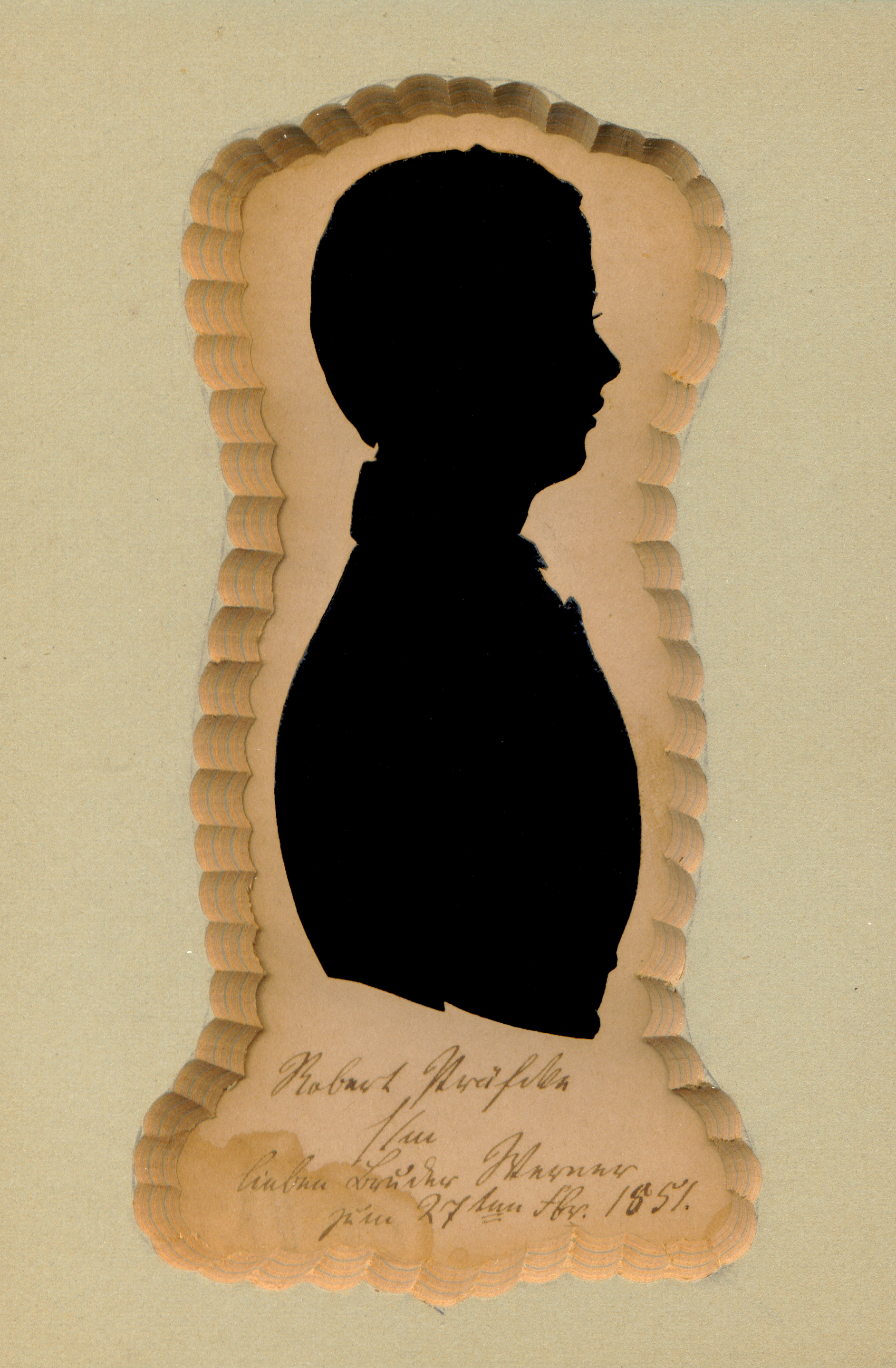 Scherenschnittporträt des Juristen Robert Praefcke (1831–1910), mit Inschrift Robert Präfcke s/m [seinem] lieben Bruder Werner zum 27ten Fbr. 1851